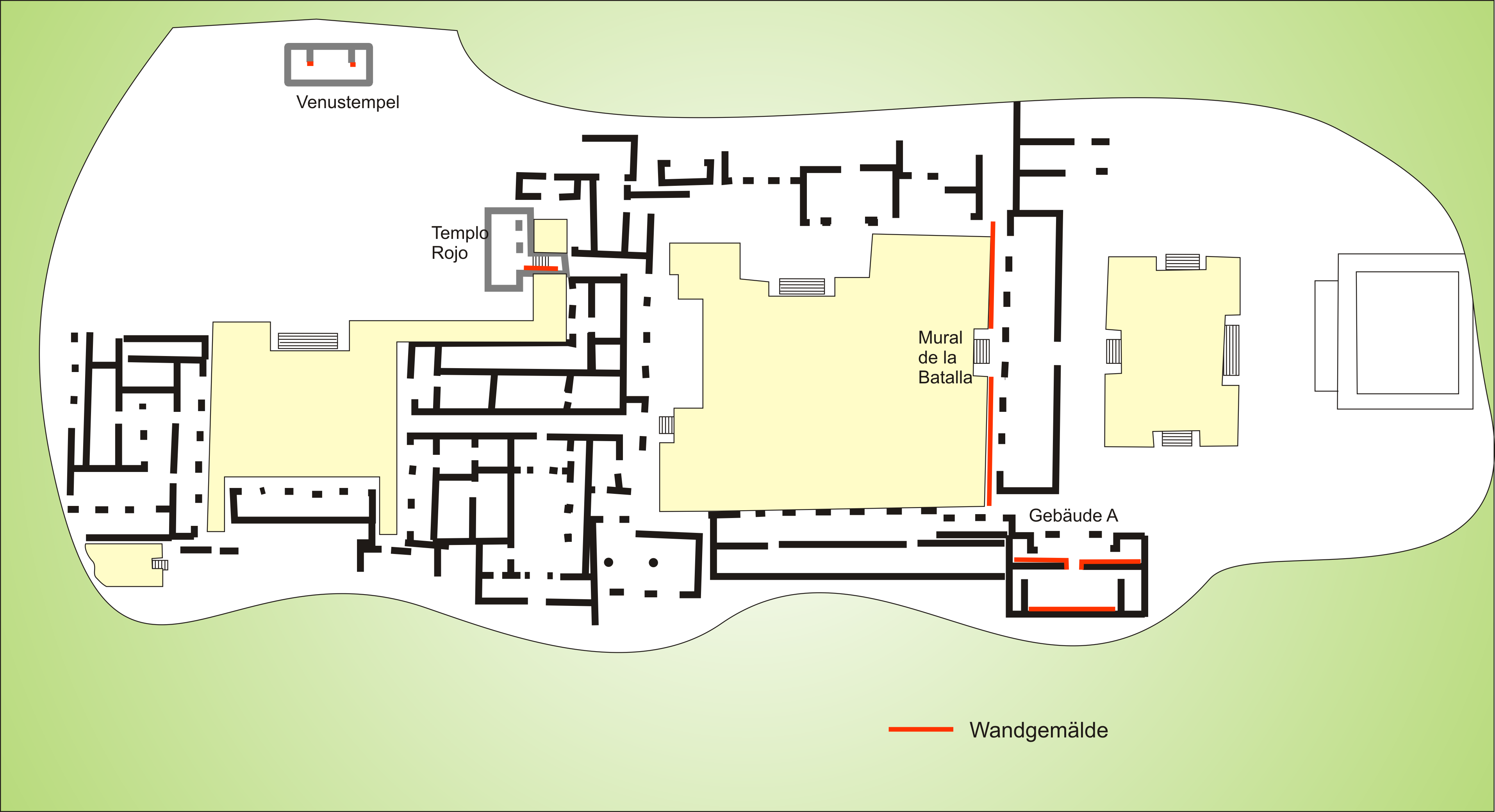 Cacaxtla, Grundriss